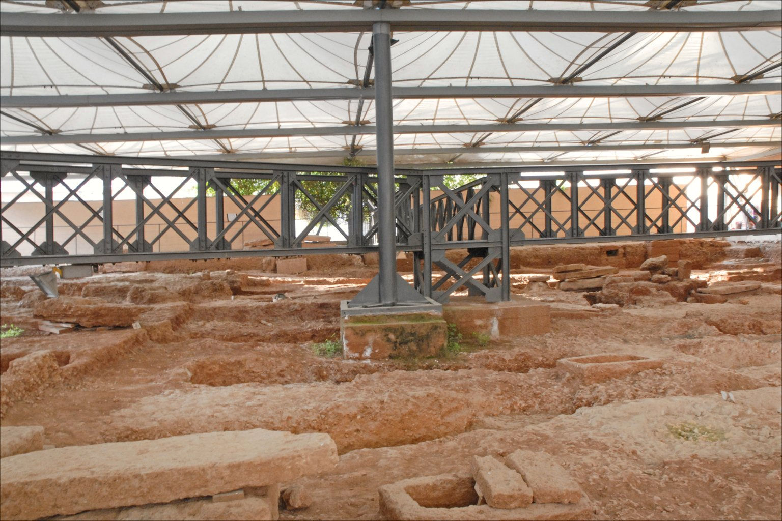 Vue générale du site archéologique avec les passerelles métalliques destinées aux visiteurs Palerme a d'abord été un comptoir carthaginois, la première implantation punique à Palerme date du 7ème siècle avant J.-C. Quelques tombes de cette époque ont été retrouvées dans la grande nécropole ouest de la ville antique. La partie de la nécropole photographiée ci-dessus a été fouillée ces dernières années, elle est située sur un terrain militaire sur lequel se trouve également la Cuba, palais de l'époque arabo-normande. Plusieurs types de tombes et de rites (incinération, inhumation,..) ont été découverts sur ce site archéologique dont la période va de la fin du 7ème siècle avant J.-C. au début du 3ème siècle avant J.-C.